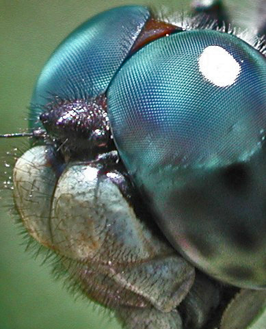 Facettenae vun enger Libell.